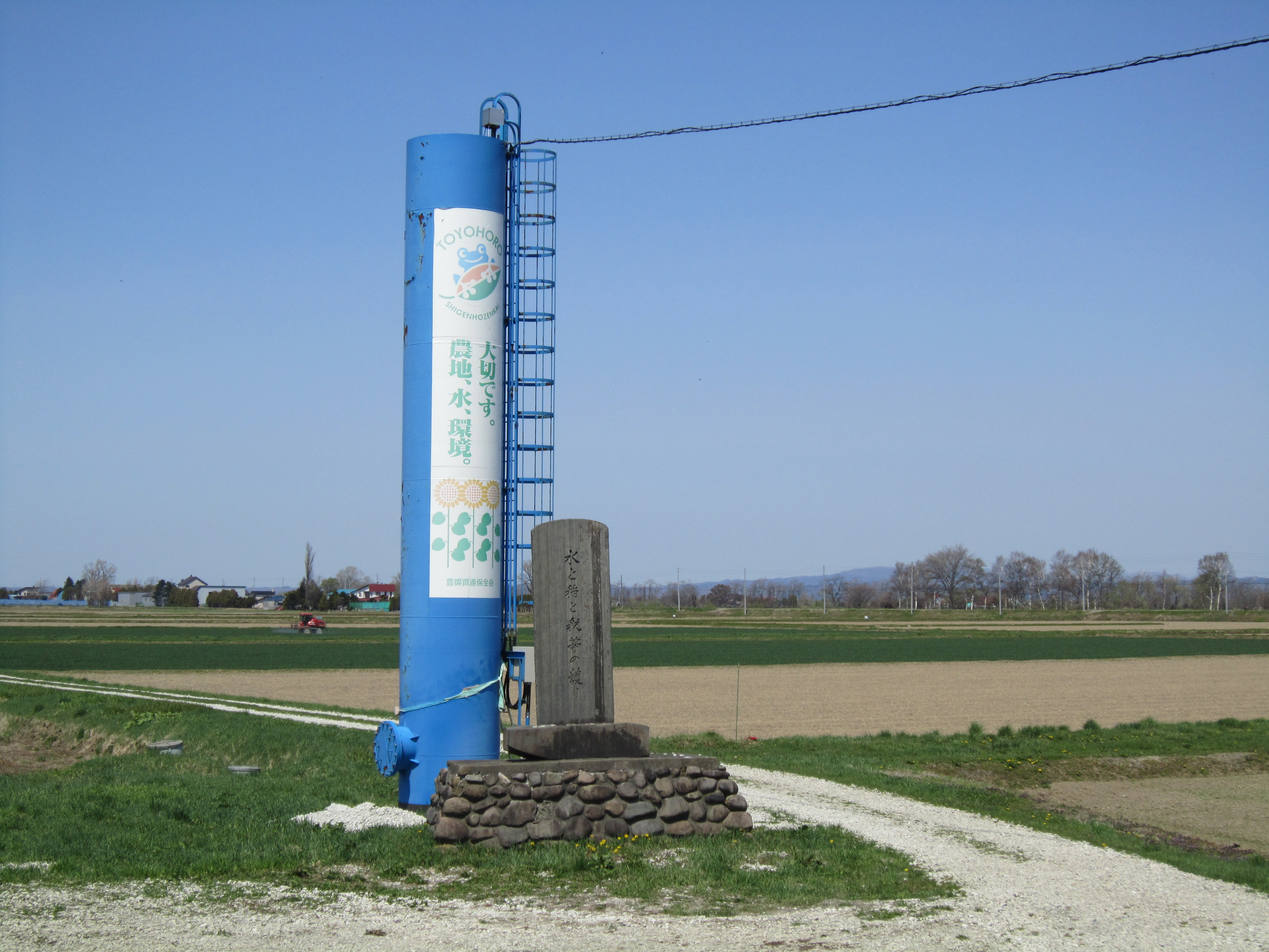 巴農場の碑